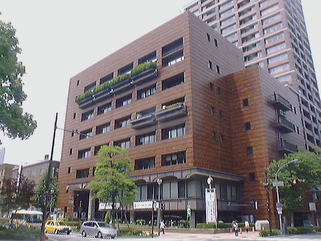 Naka-ku Ward Office, Naka-ku, Yokohama, Kanagawa, Japan (中区役所)